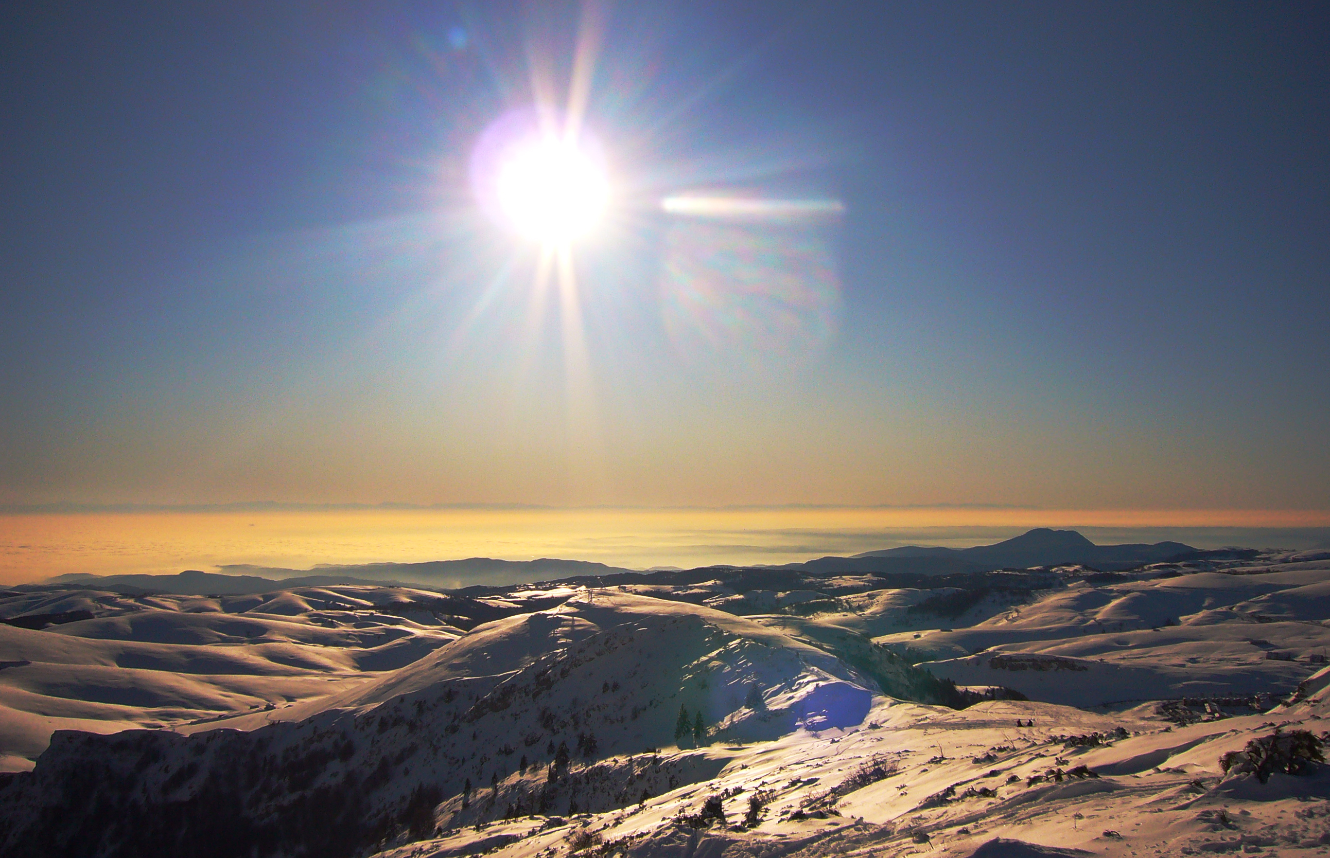 L'altopianio della Lessinia e la pianura da Cima Trappola